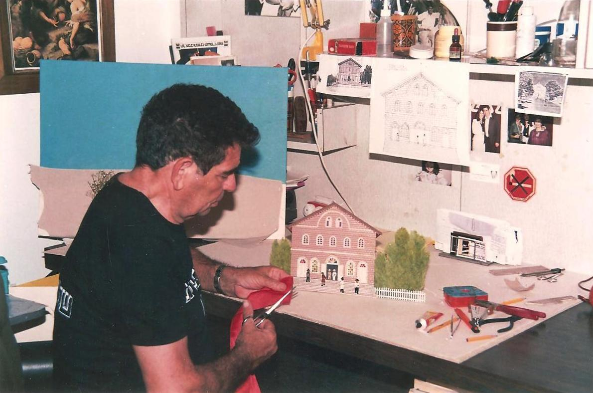 the artist yosef shalhin